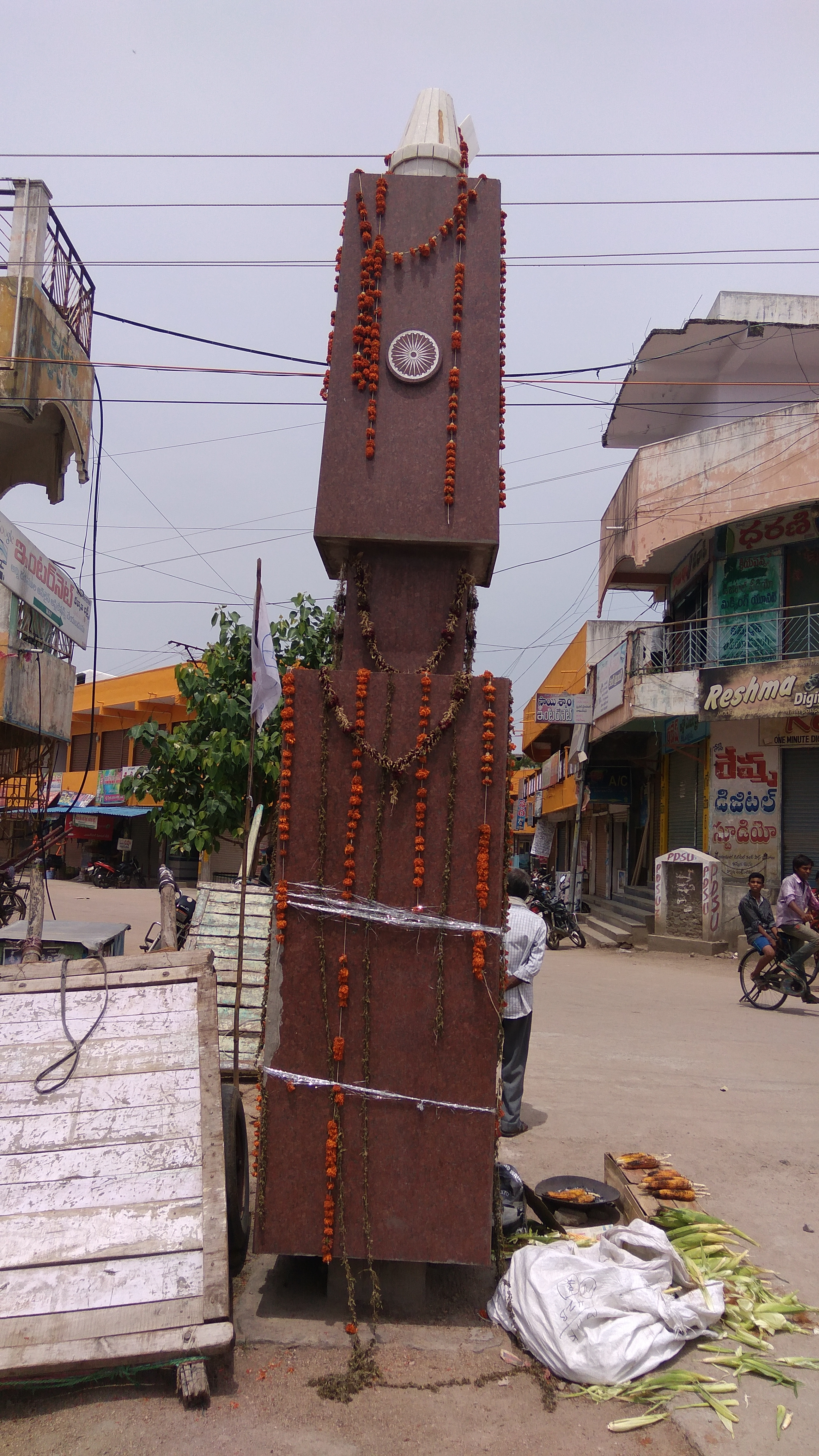 హుజురాబాద్ లోని తెలంగాణ అమరవీరుల స్థూపం